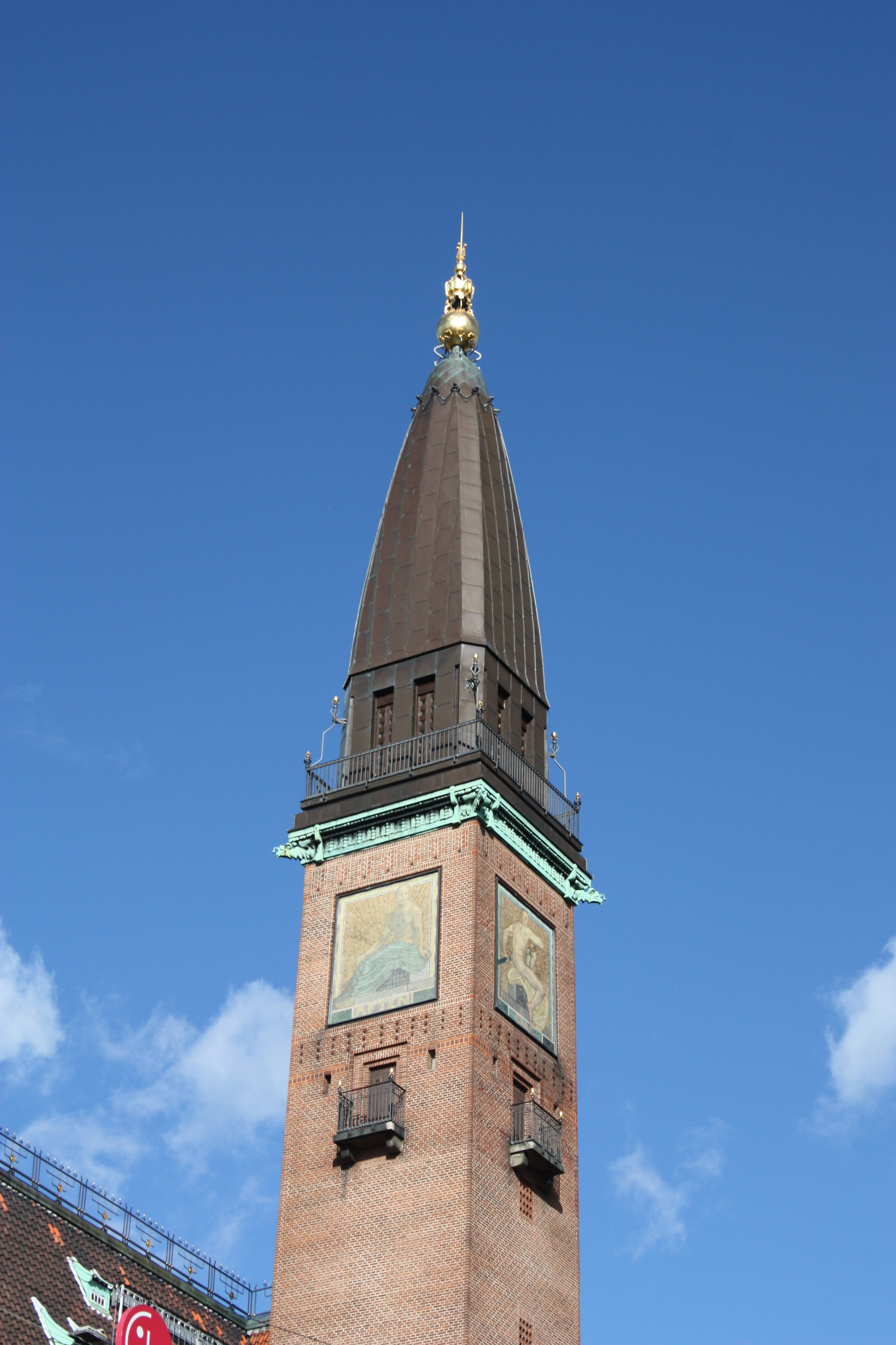 Kopenhagen 2009